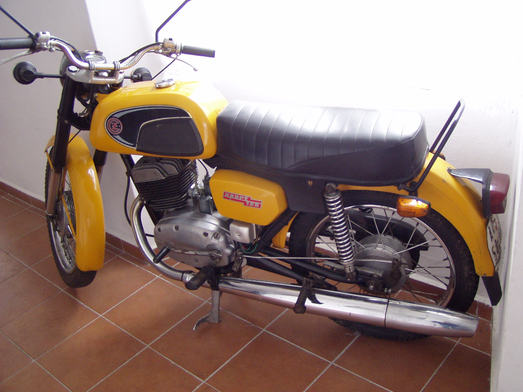 ČZ 125 sport (typ 476)